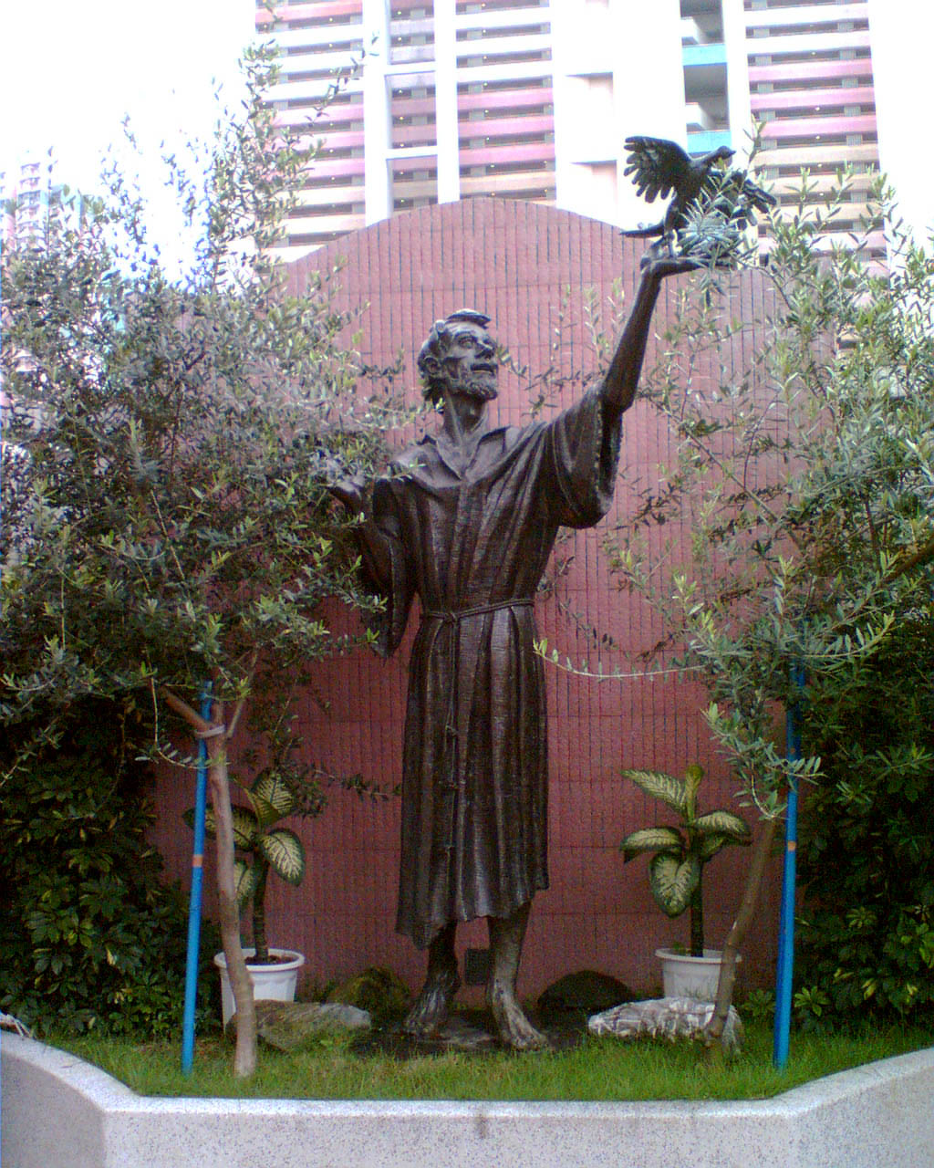 中文（香港）: 馬鞍山聖方濟堂內的方濟銅像。用Photoshop Elements調整色彩及對比。